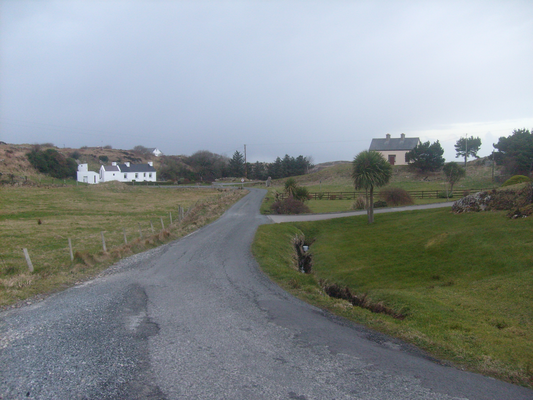 Ranafast